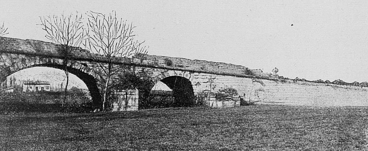 Dictionnaire illustré des communes du département du Rhône. Tome 1 / par MM. E. de Rolland et D. Clouzet.